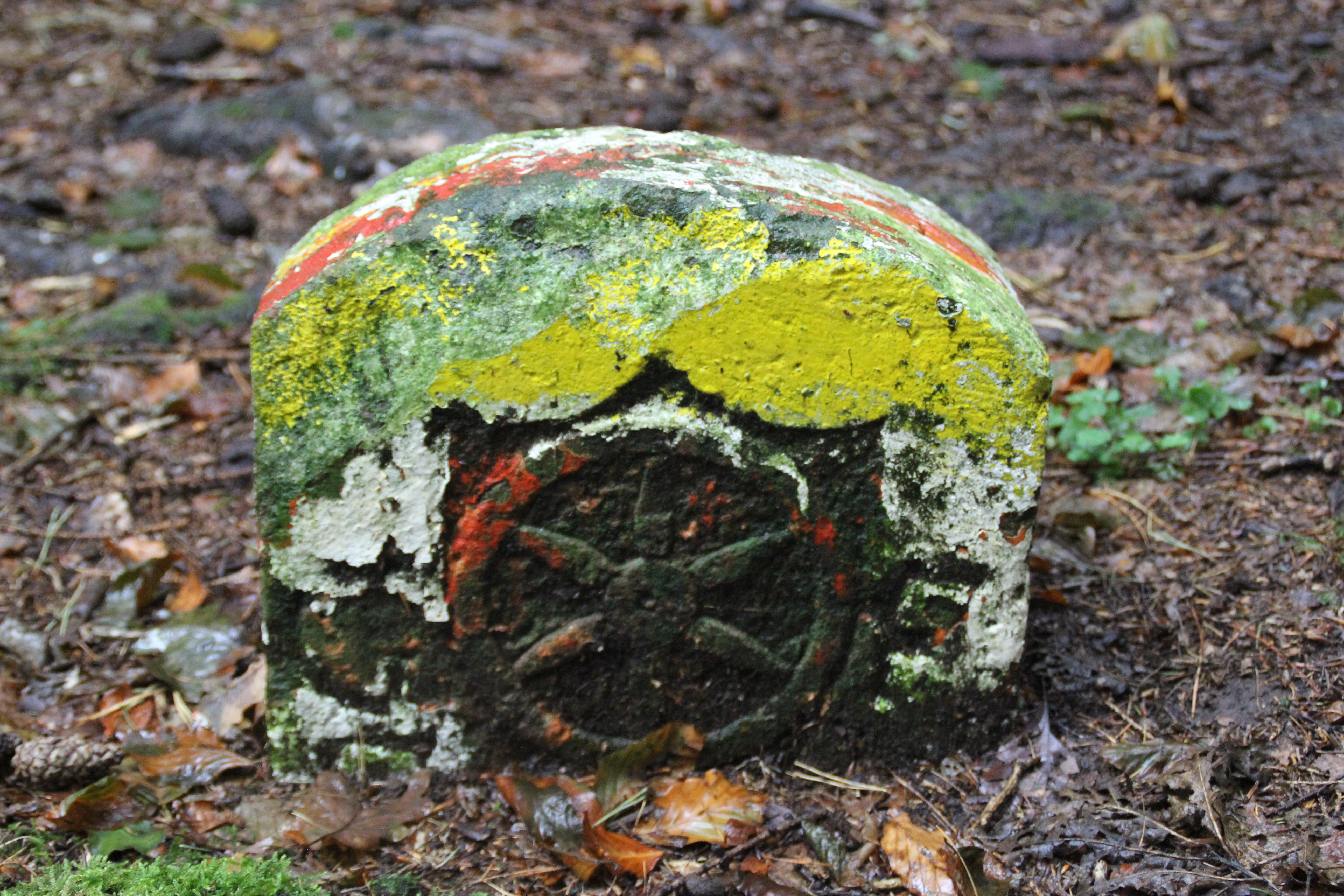 Grenzstein 105 auf dem Rabengrundkopf zwischen Hörstein und Mömbris